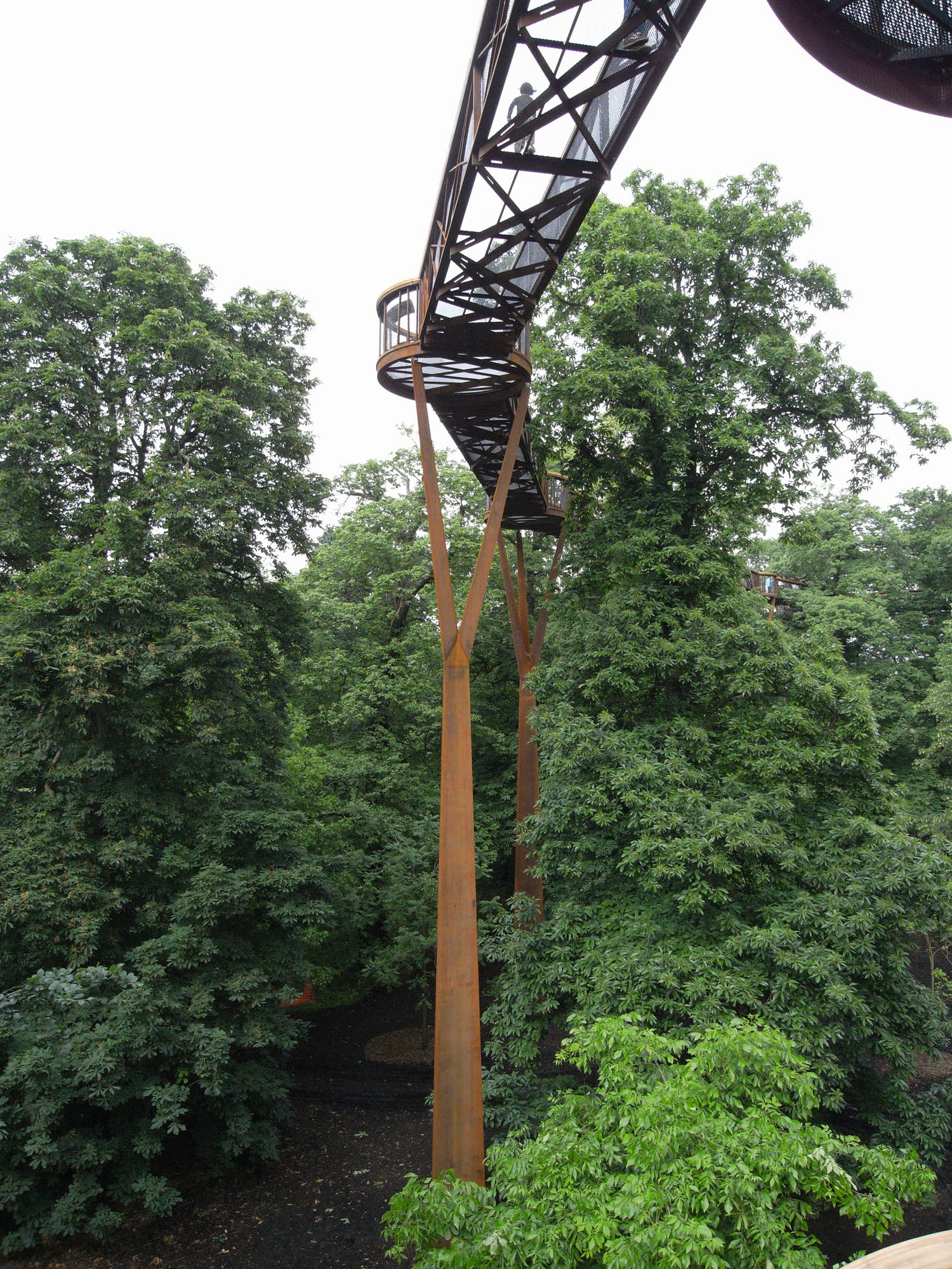 Tree walk in Kew Gardens, London